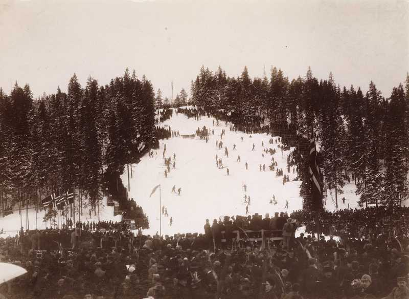 Holmenkollbakken